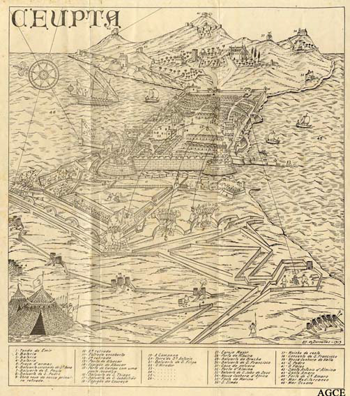 Ceuta en torno al año 1700 durante el asedio de los treinta y tres años (1694-1727)